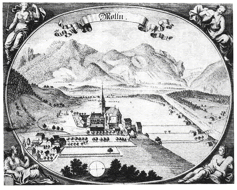 Ansicht der oberösterreichischen Gemeinde Molln um 1692/93. Die allegorischen Figuren stehen für Gerechtigkeit, Mäßigkeit, Klugheit und Stärke. Stich nach einer Zeichnung Johann Carl von Reslfelds.